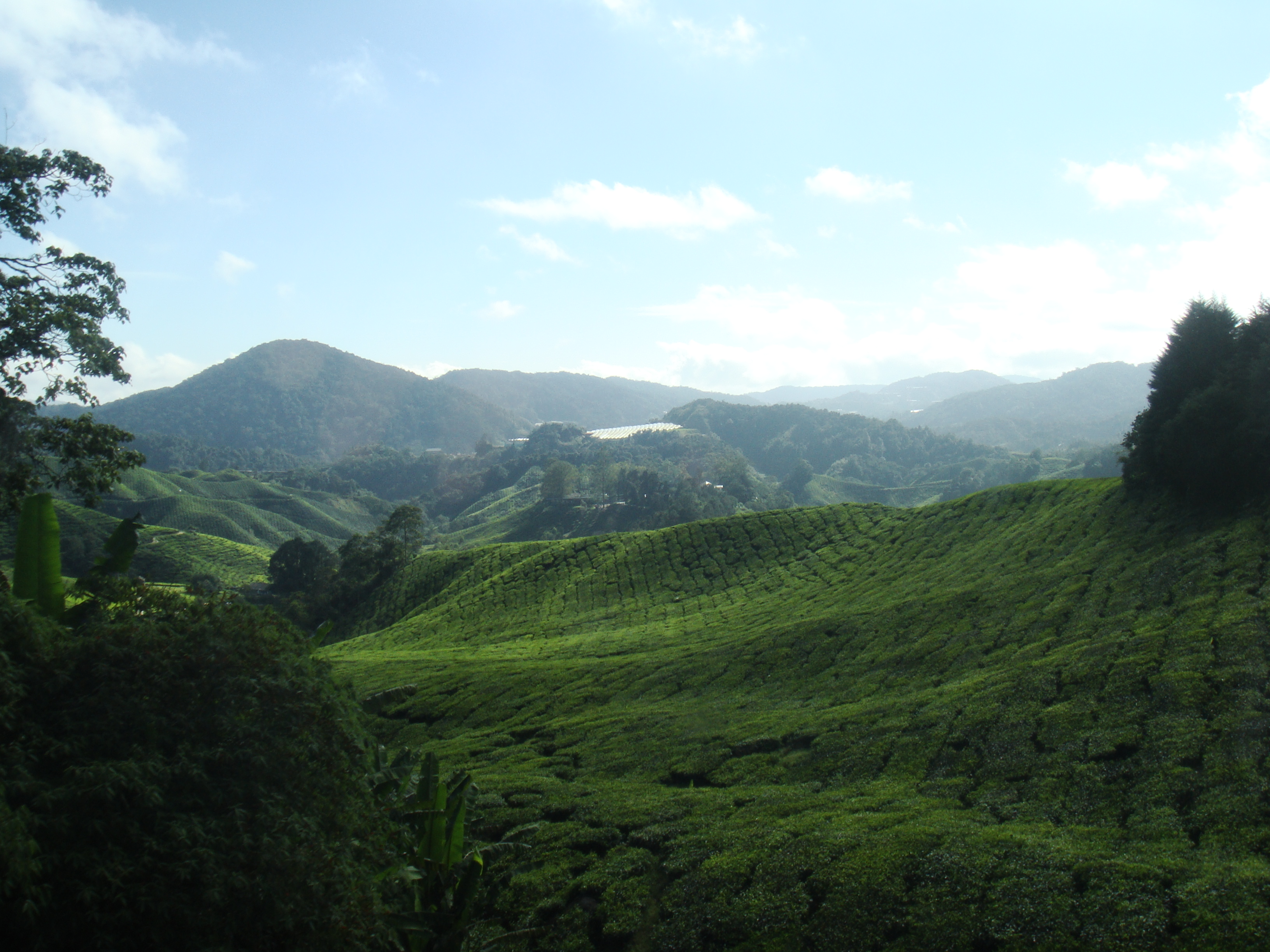 Pemandangan ladang teh